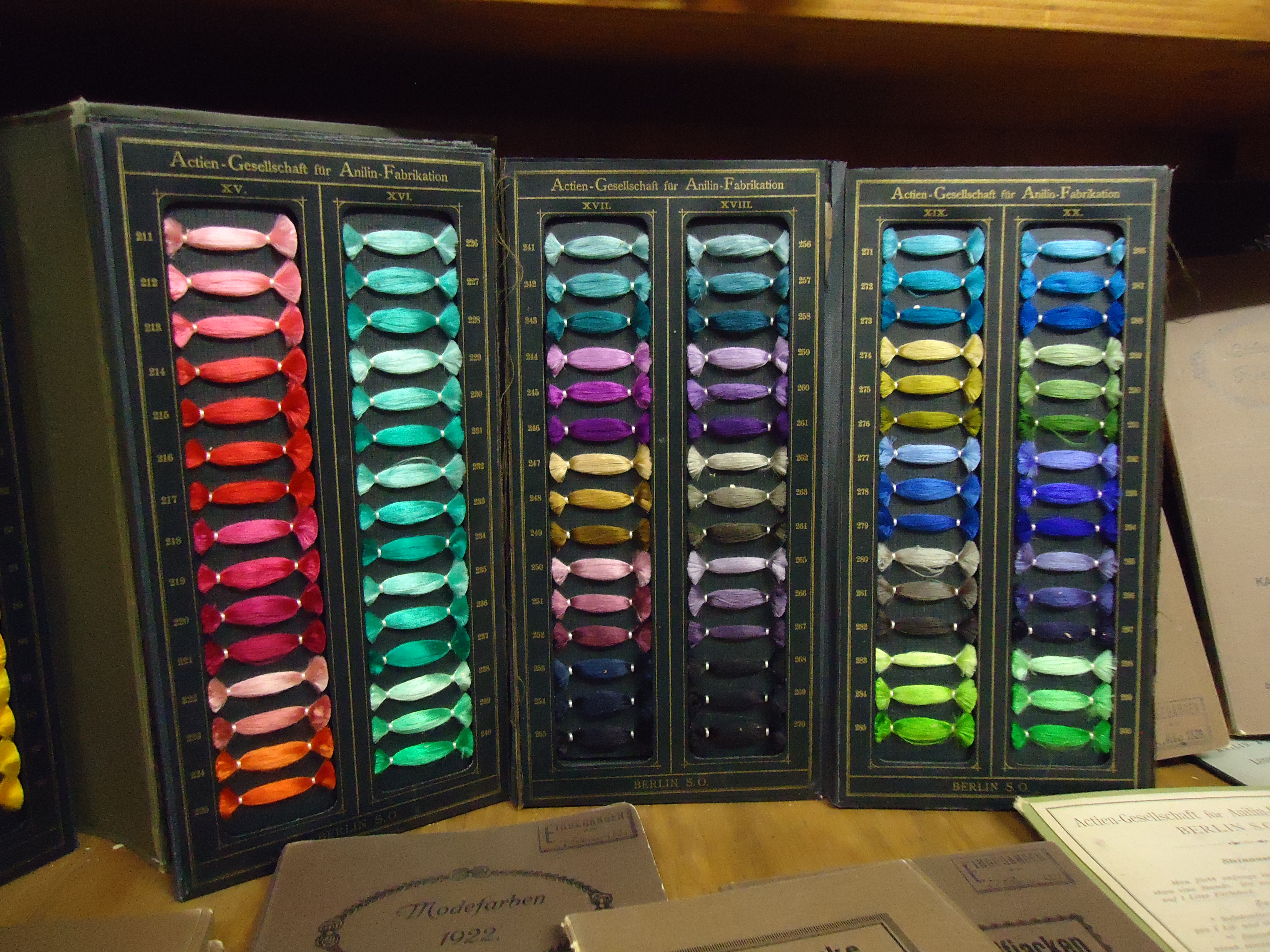 Blick in die Historische Farbstoffsammlung der TU Dresden (Historische Farbstoffsammlung der TU Dresden)